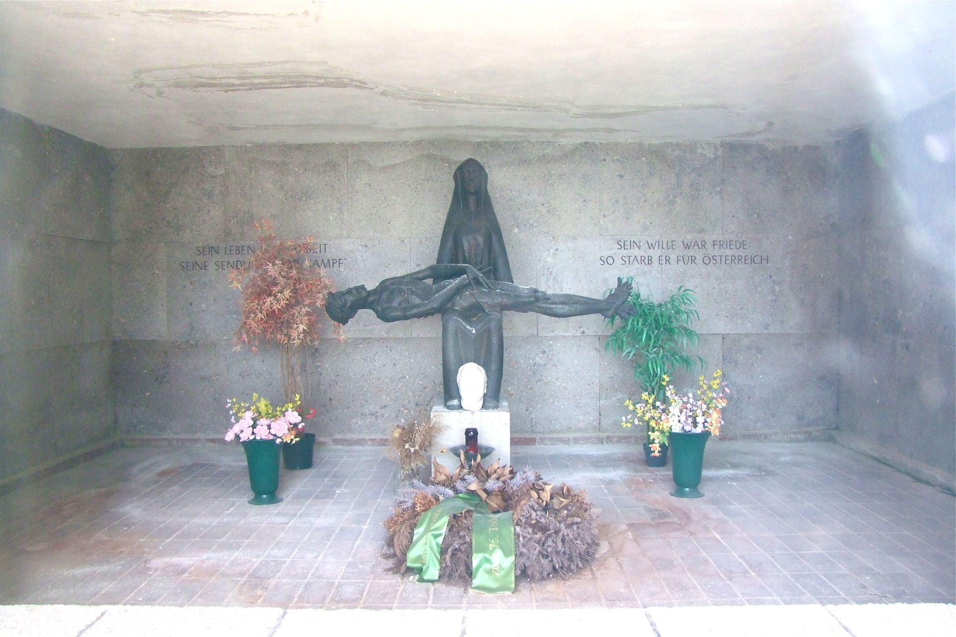 Engelbertkirche mit Dr. Dollfuß-Gedenkstätte, Pietà von Viktor Hammer.